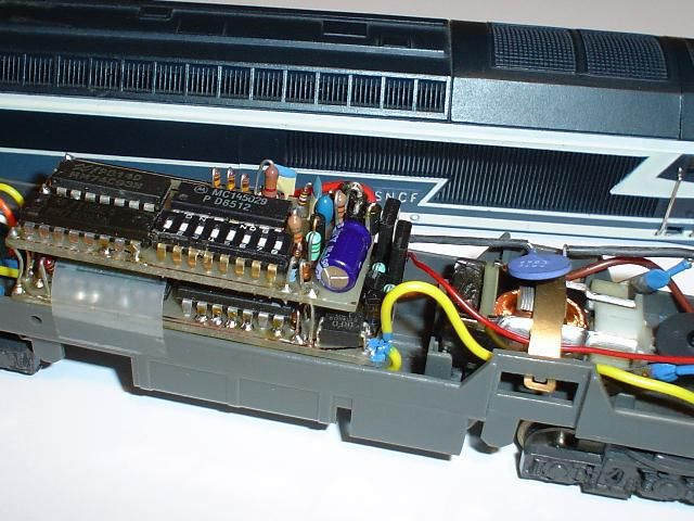 Durch einen Studenten der Fachhochschule Biel im März 1986 gebauter Dekoder für einen Gleichstrommotor für das Märklin Digital System. Der Dekoder wurde wegen des Platzbedarfs in eine H0-Diesellokomotive der Baureihe CC 72000 von Jouef eingebaut. Solche und ähnliche Lokomotiven von Lima und Jouef mit einem verhältnismässig grossen leeren Innenraum eigne(te)n sich sehr gut zu Nachrüstung/Umbau vom Zweileiter-Gleichstrom- auf das Dreileiter/Mittelleiter-Digital-System.